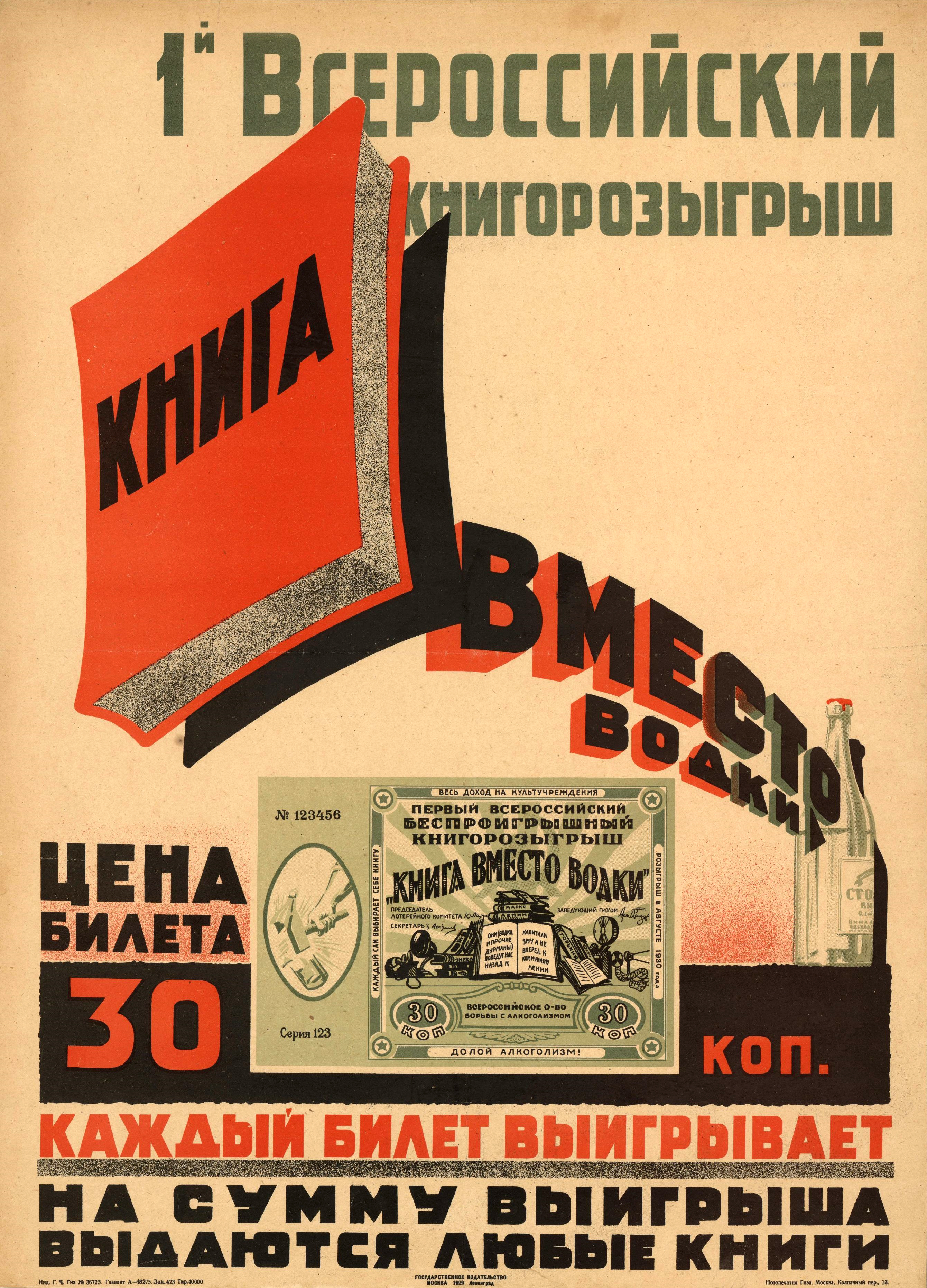 Рекламный плакат «1-й Всероссийский книгорозыгрыш „Книга вместо водки“». Москва ; Ленинград : Государственное издательство, 1929. Цветная литография, 1 лист, 72×51 см, 40 000 экз.